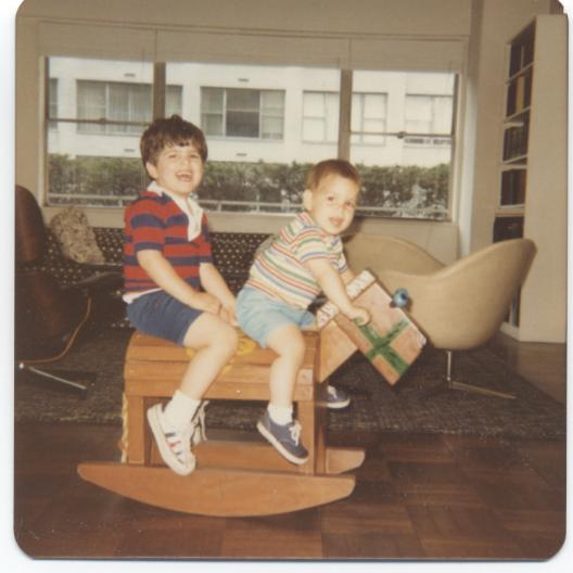 wooden rocking horse